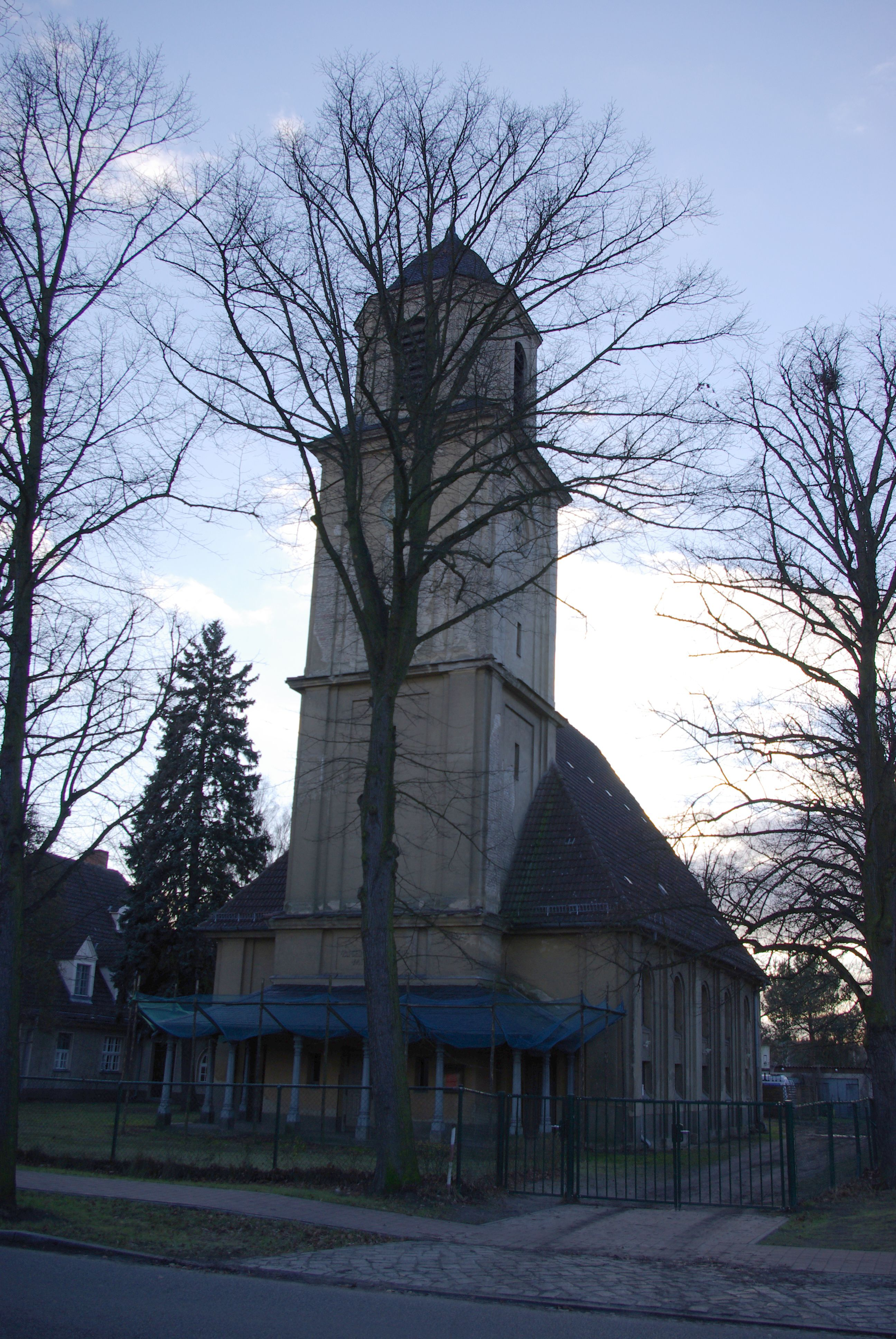 Halbe, Brandenburg, Deutschland, die Kirche